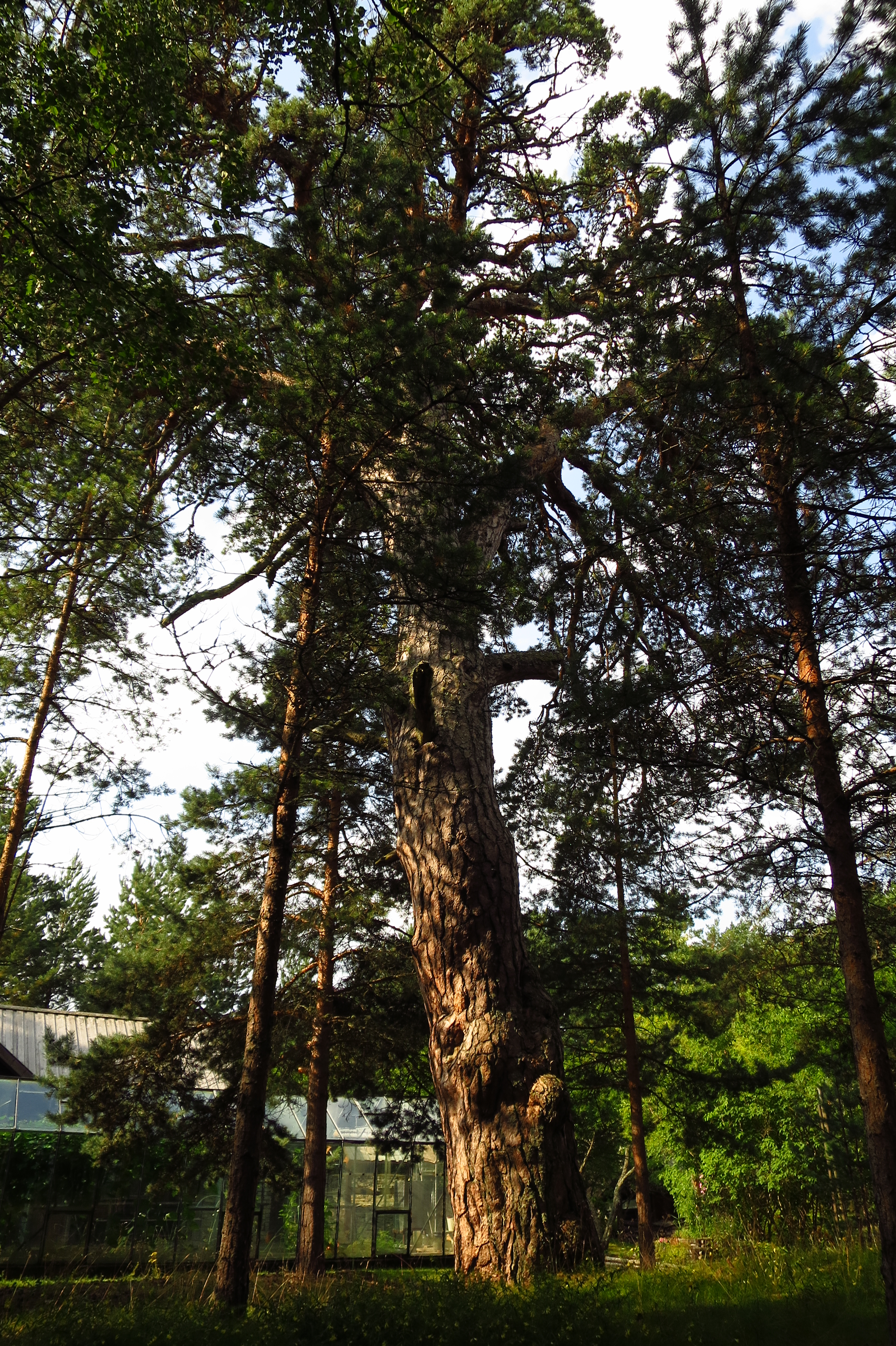 Eesti vanimad männid Pedassaare neemel